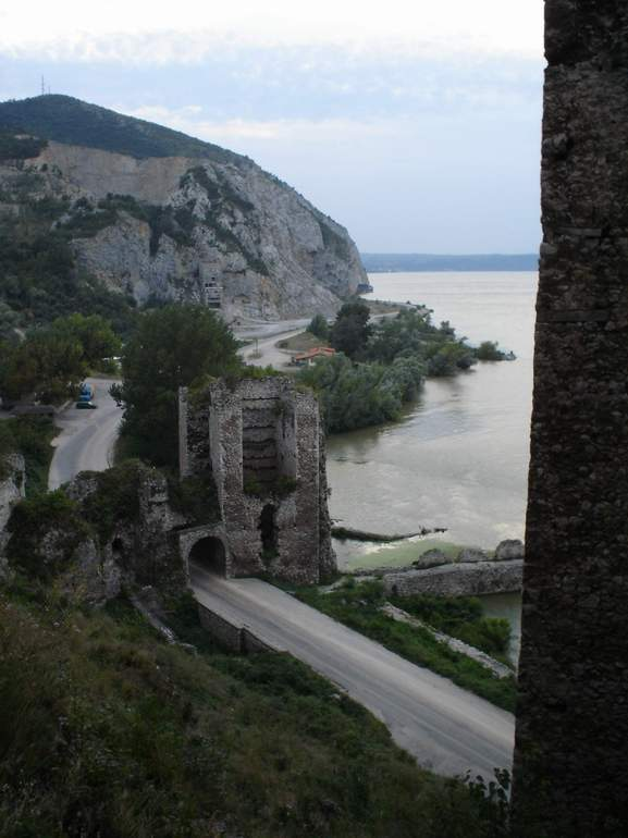 Front Gate.